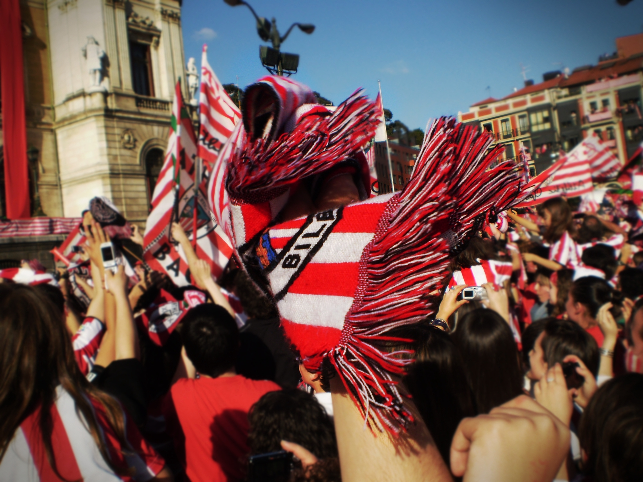 Foto sacada en la recepción del Athletic después de perder la final de copa de 2009.